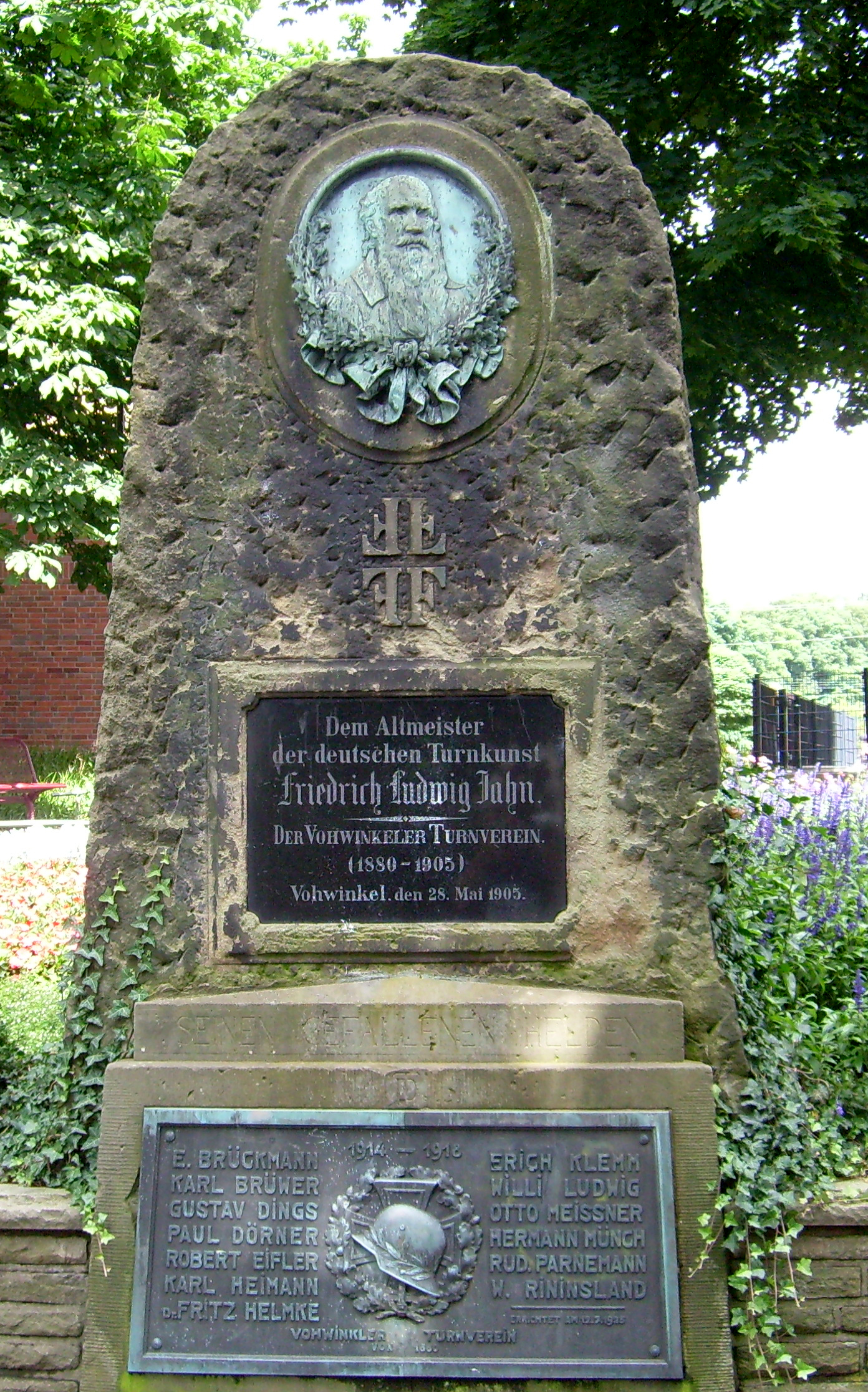 Jahn-Denkmal in Wuppertal im Vohwinkeler Stationsgarten